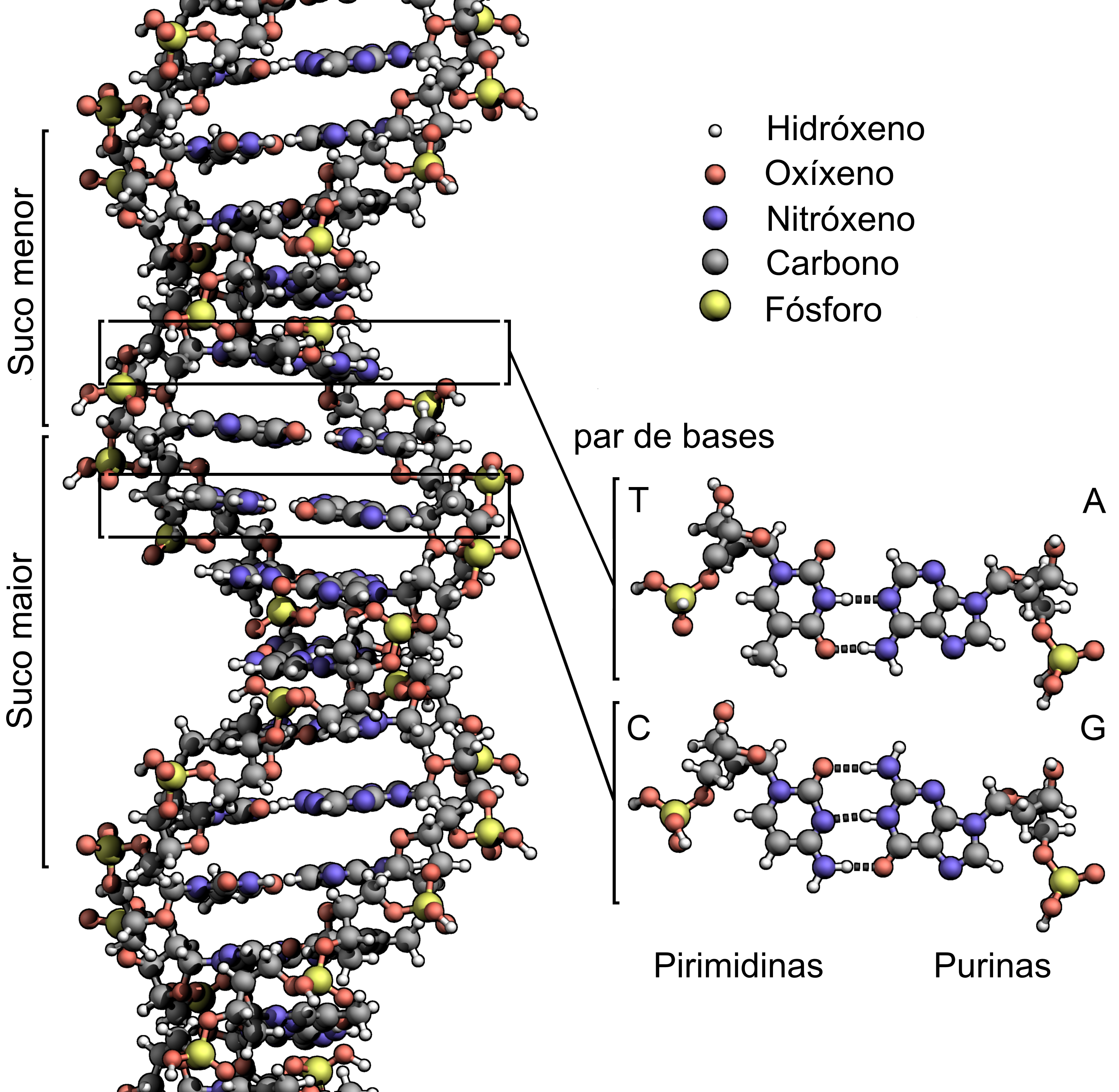 Estrutura do ADN (DNA structure).